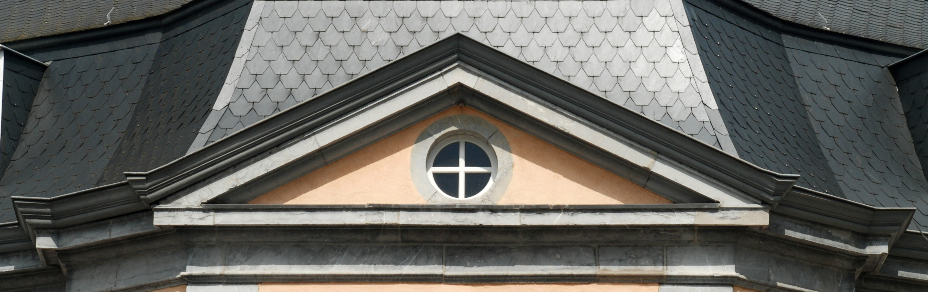 Belgique - Province de Liège - Hôtel de ville de Theux